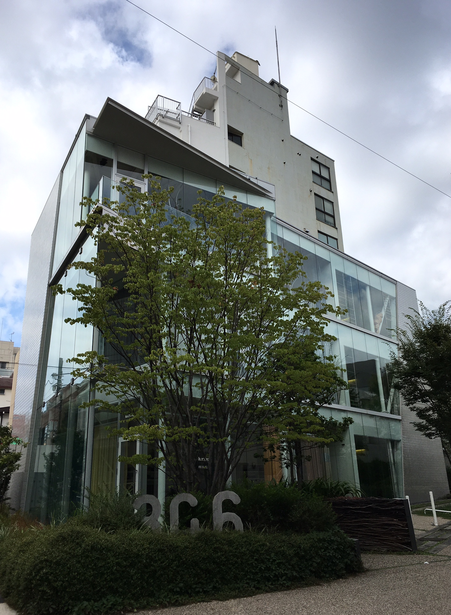 佐々木龍一設計の建築